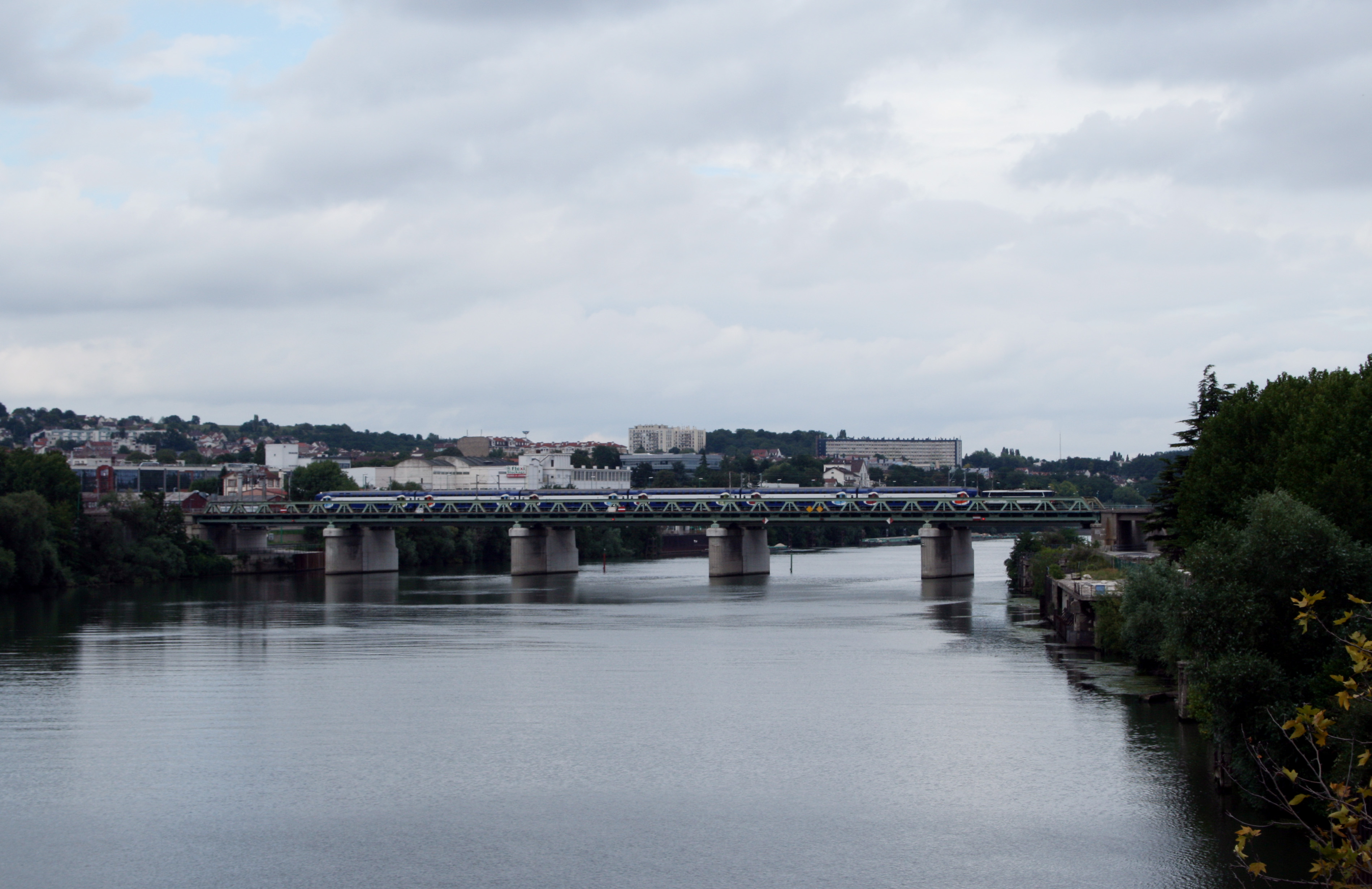 Pont de chemin de fer d'Argenteuil